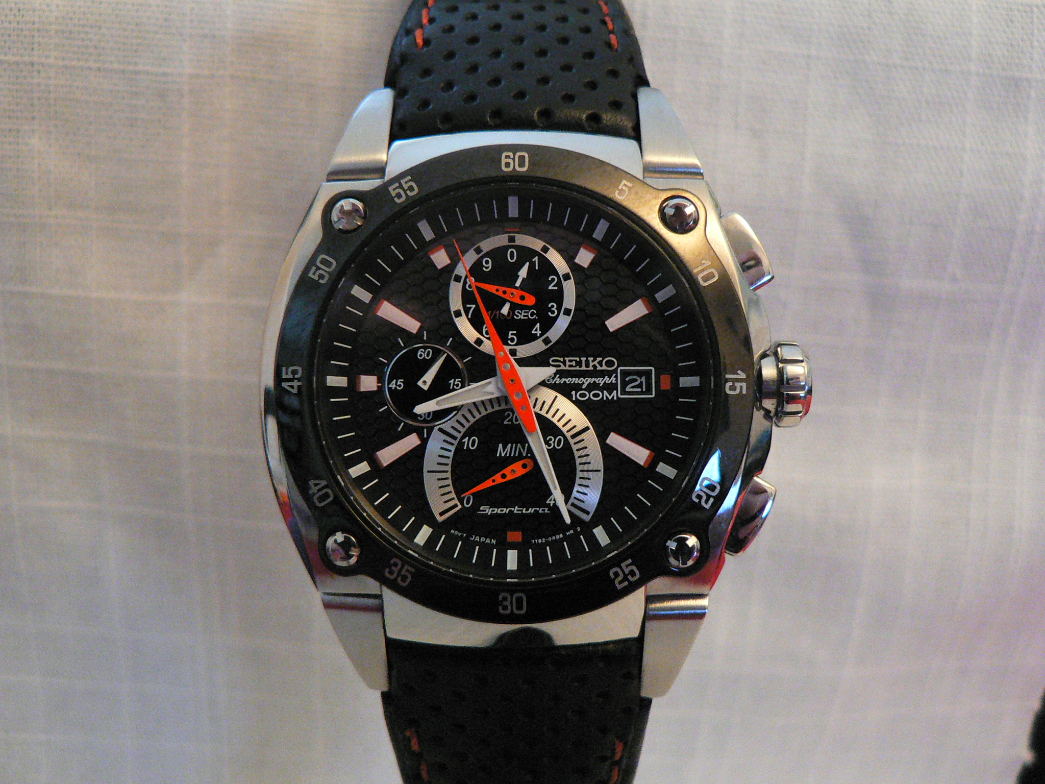 Montre Seiko Sportura